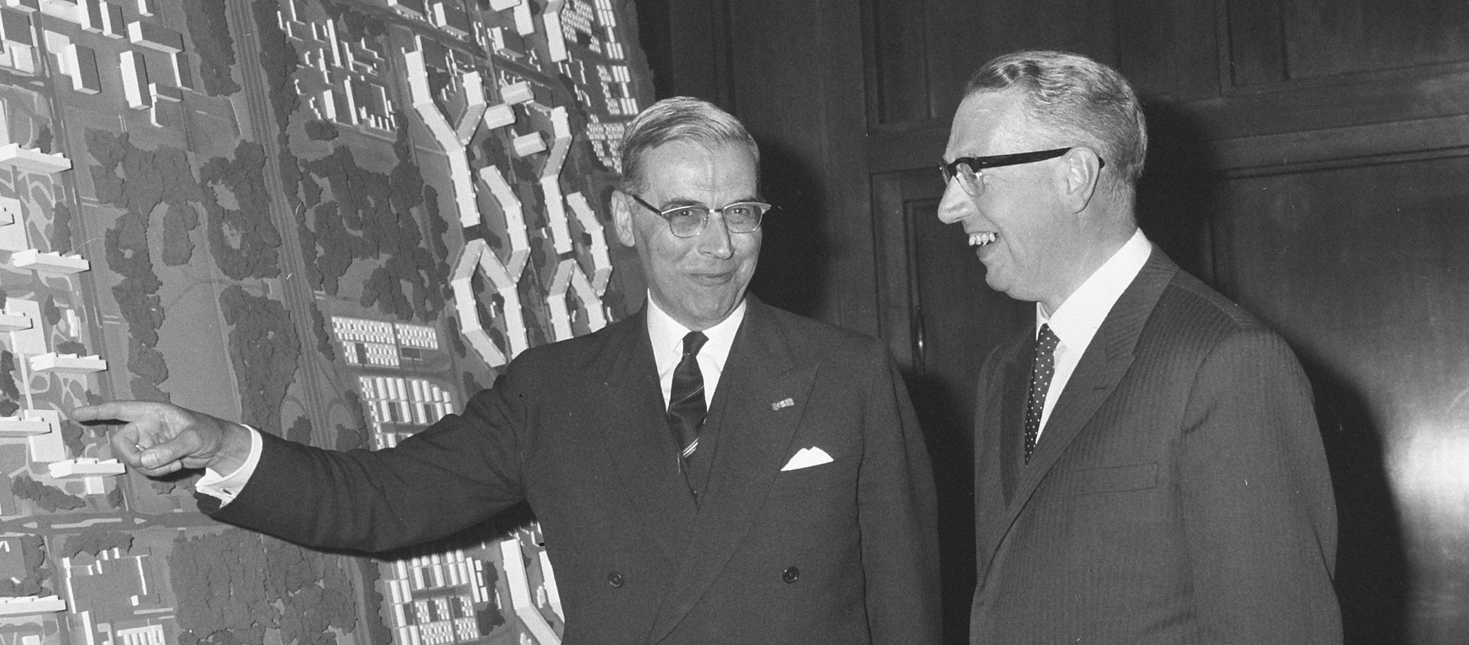 Collectie / Archief : Fotocollectie Anefo Reportage / Serie : [ onbekend ] Beschrijving : Zuidoostelijke stadsuitbreiding van Amsterdam, burgemeester Van Hall (links) en burgemeester Kasteleijn (Weesperkarspel) bij een Datum : 3 juni 1965 Locatie : Amsterdam, Noord-Holland Trefwoorden : Stadsuitbreidingen, burgemeesters, maquettes Fotograaf : Evers, Joost / Anefo Auteursrechthebbende : Nationaal Archief Materiaalsoort : Negatief (zwart/wit) Nummer archiefinventaris : bekijk toegang 2.24.01.03 Bestanddeelnummer : 917-8367